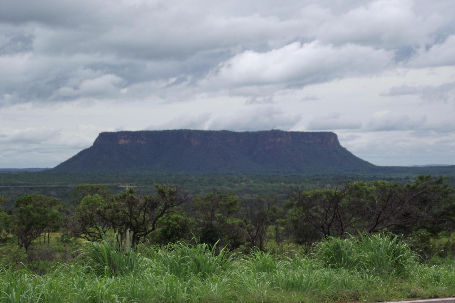 Morro do Chapéu, Carolina Maranhão, Brasil.